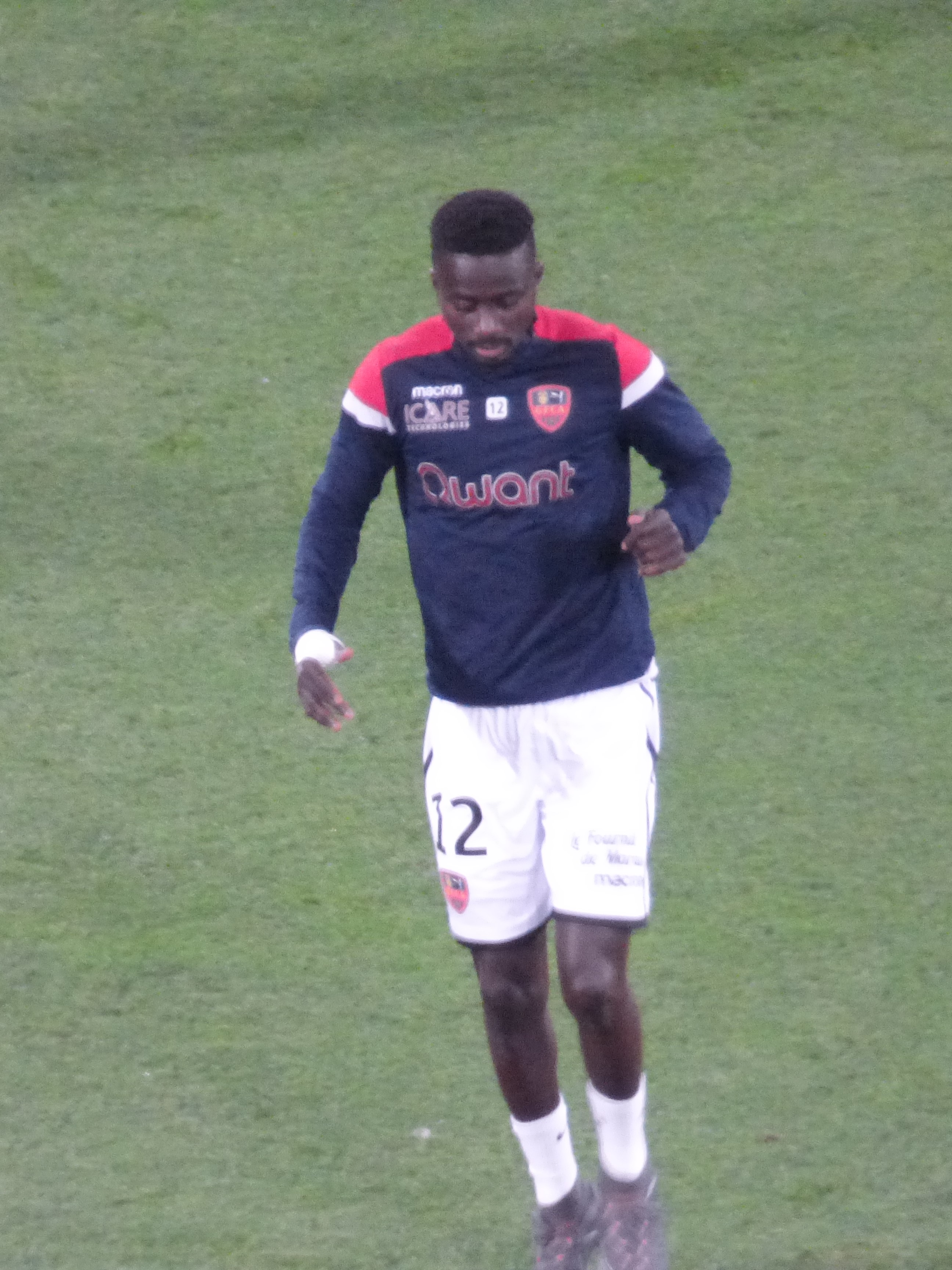 Mayoro N'Doye avant le match RC Lens / GFC Ajaccio, comptant pour la onzième journée du championnat de France de Ligue 2 2018-2019 au Stade Bollaert-Delelis, le 22 octobre 2018.